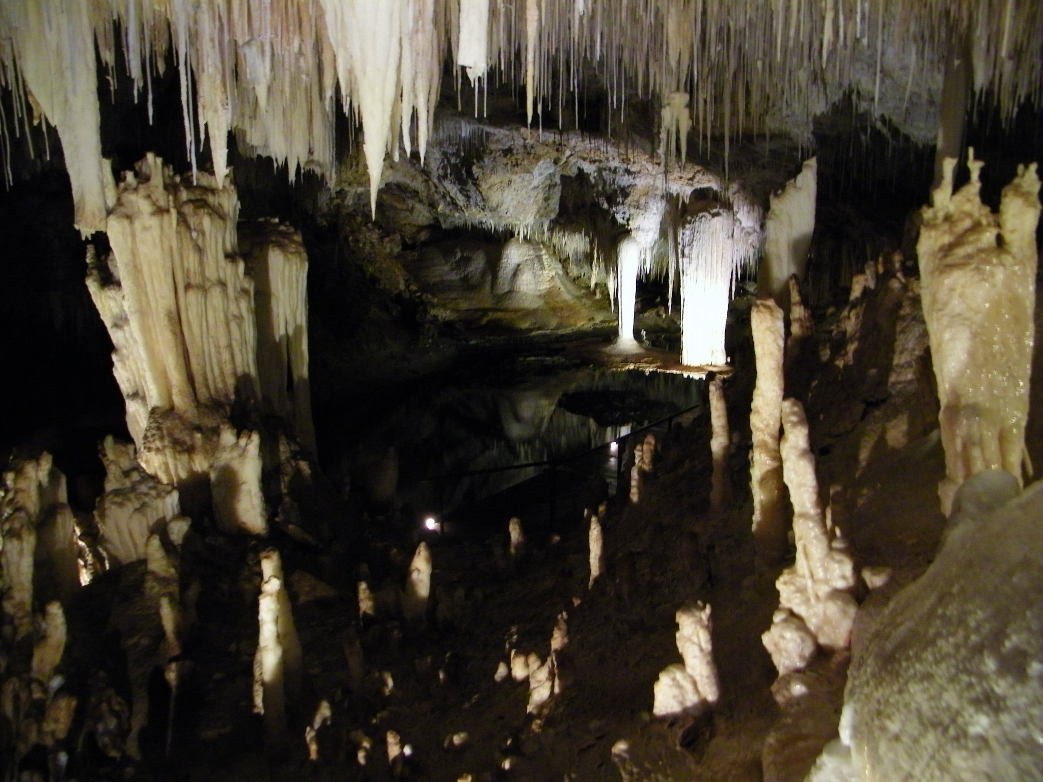 Lake Cave @ Margaret River